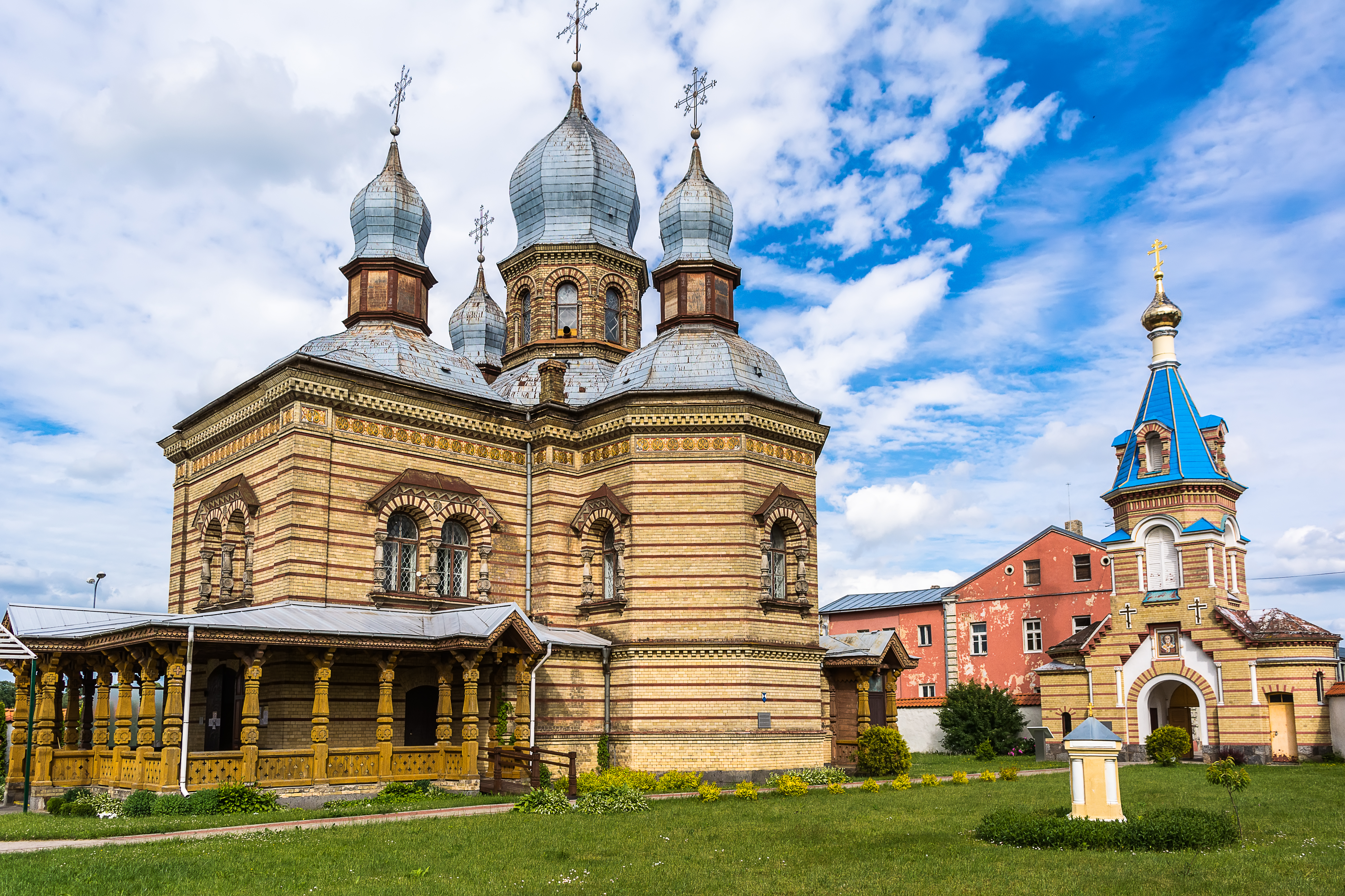 Jēkabpils Svētā Gara klosteris, Jēkabpils, Brīvības iela 200/202; Brīvības iela 204